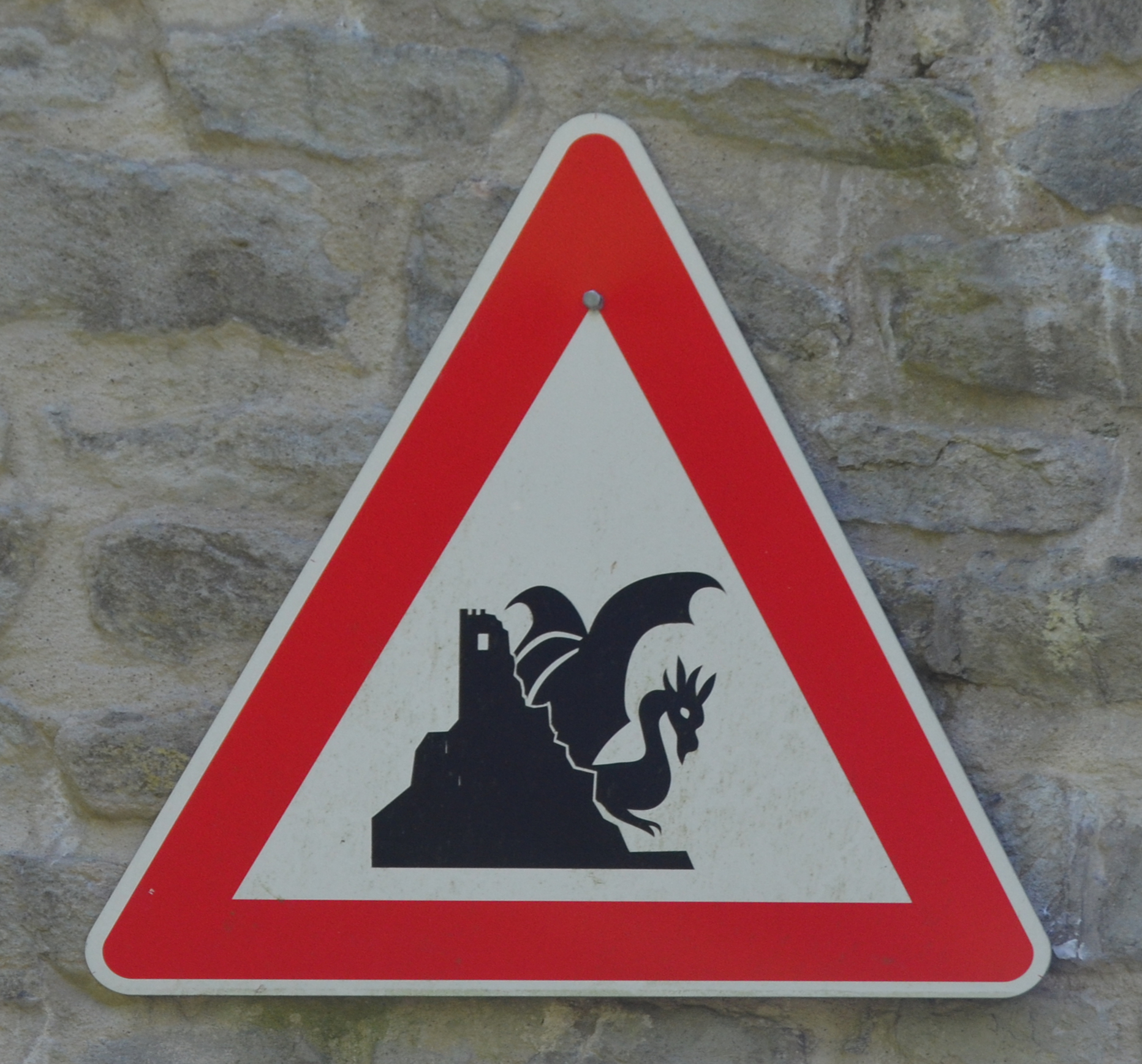 Warnschild Drache, aufgenommen aus der Drachenfelsbahn